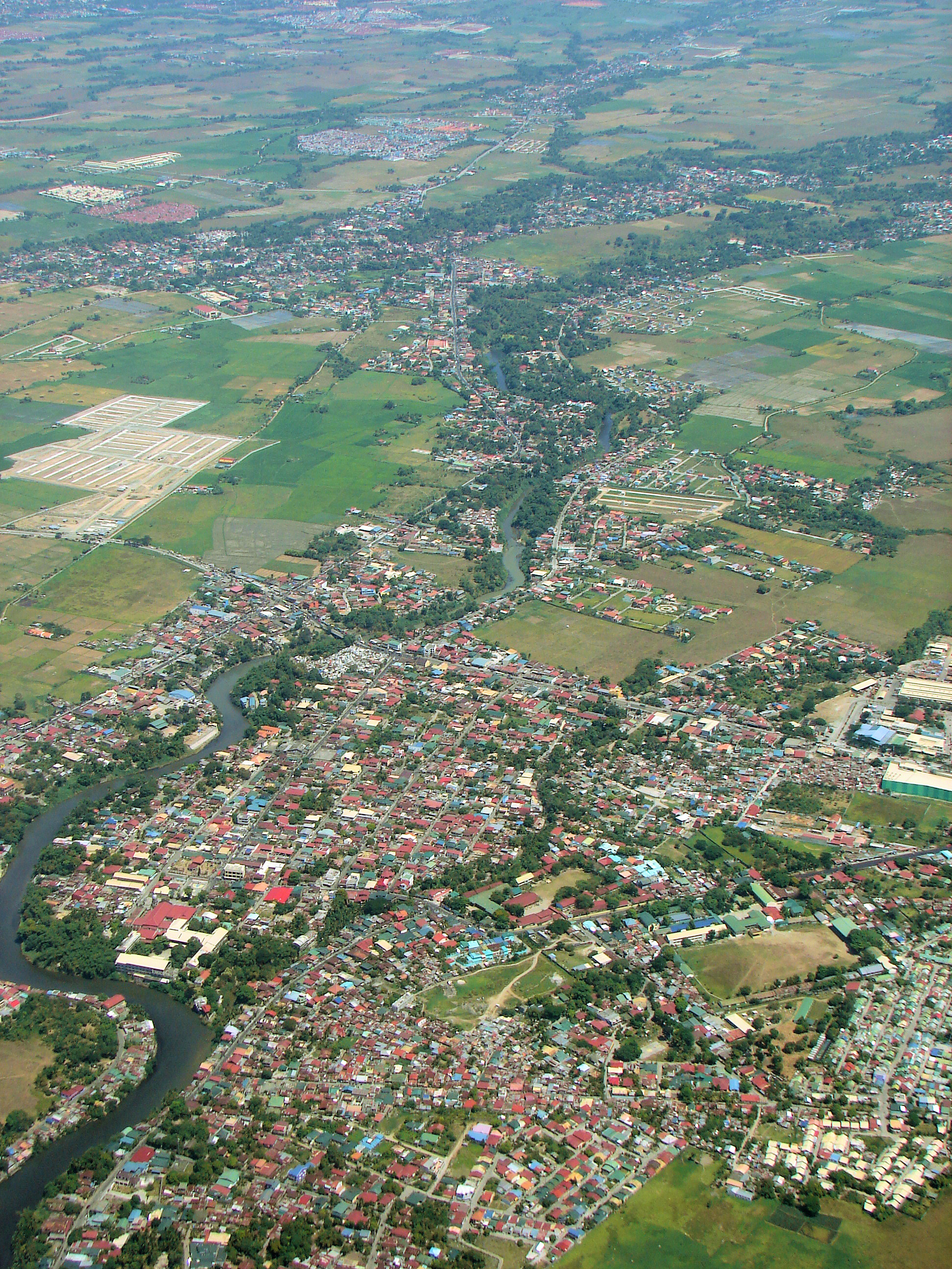 Tanza, Cavite, Philippines